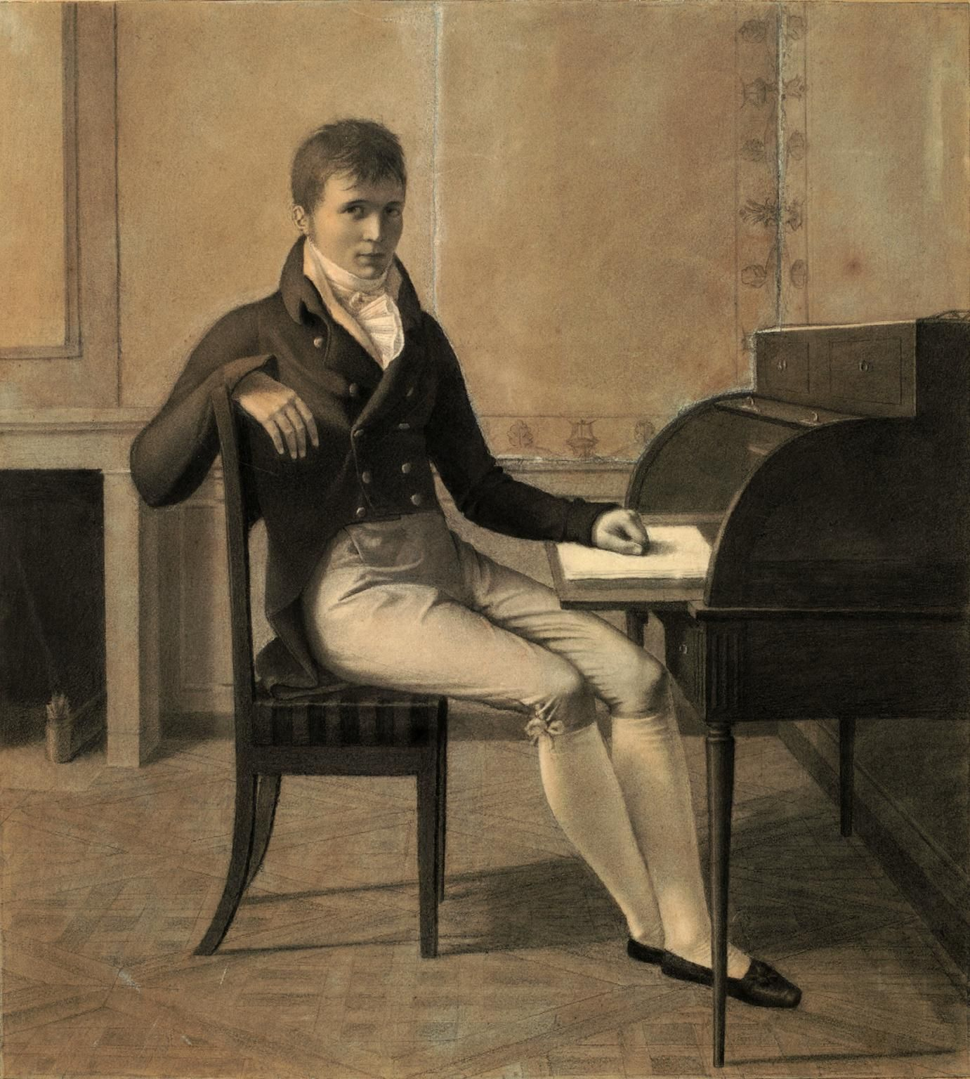 E. Marcellot: Der Mathematiker Siméon-Denis Poisson (1781–1840), 1804. Kohlezeichnung, 62 x 57 cm. Collections École polytechnique-Palaiseau.